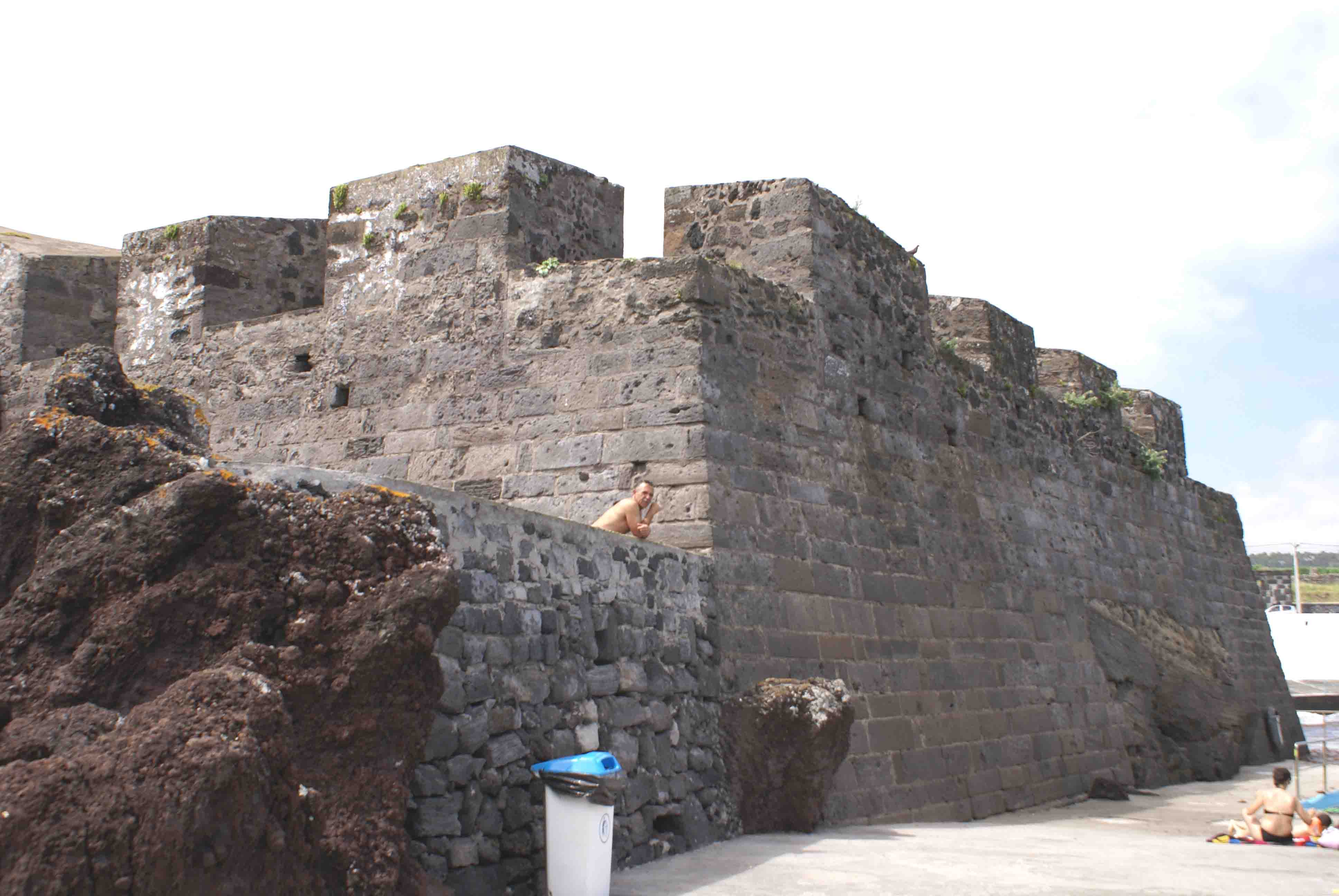 Forte do Negrito, frente, São Mateus da Calheta, Angra do Heroísmo, ilha Terceira, Açores, Portugal.